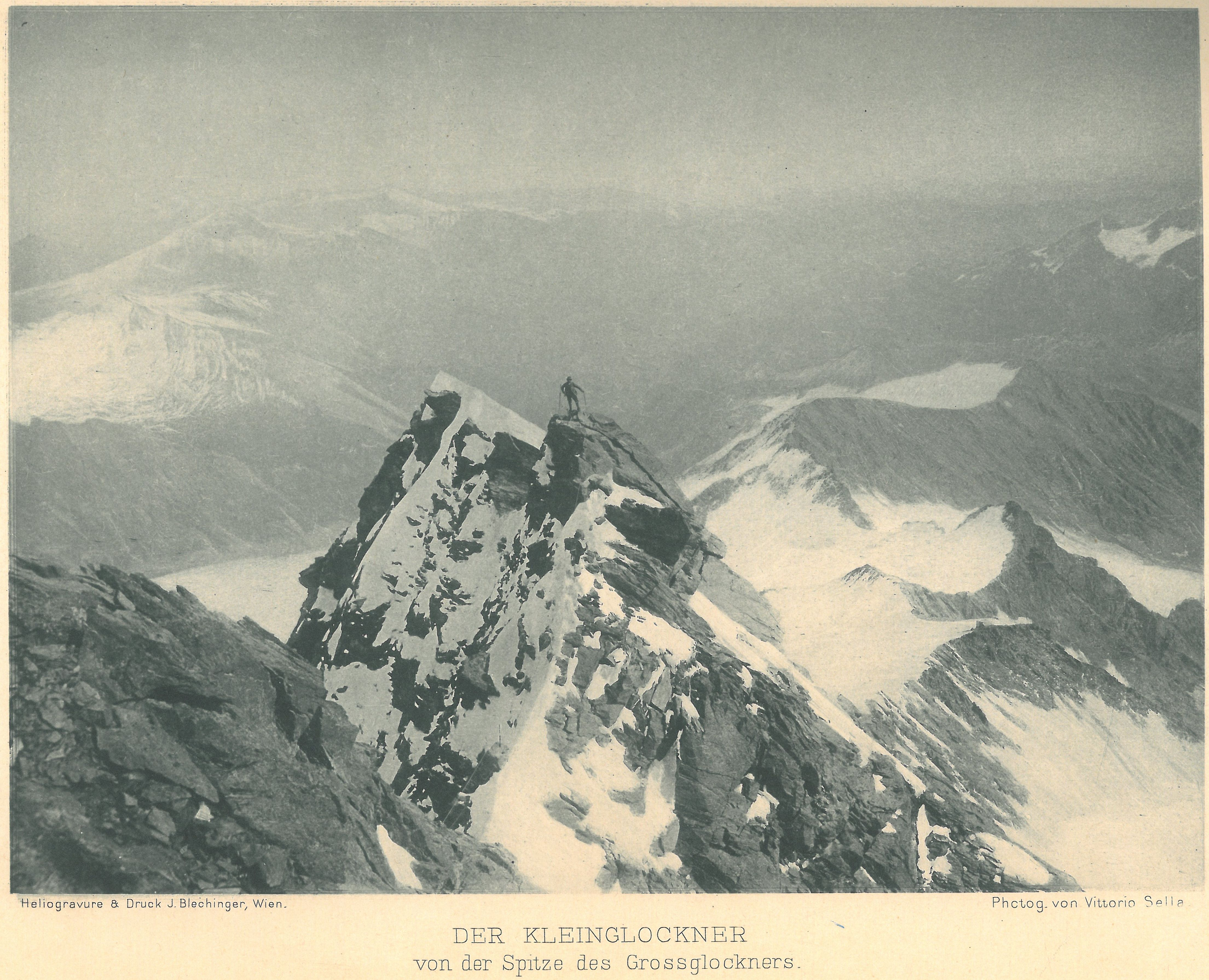 Blick vom Großglocknergipfel auf den Kleinglockner